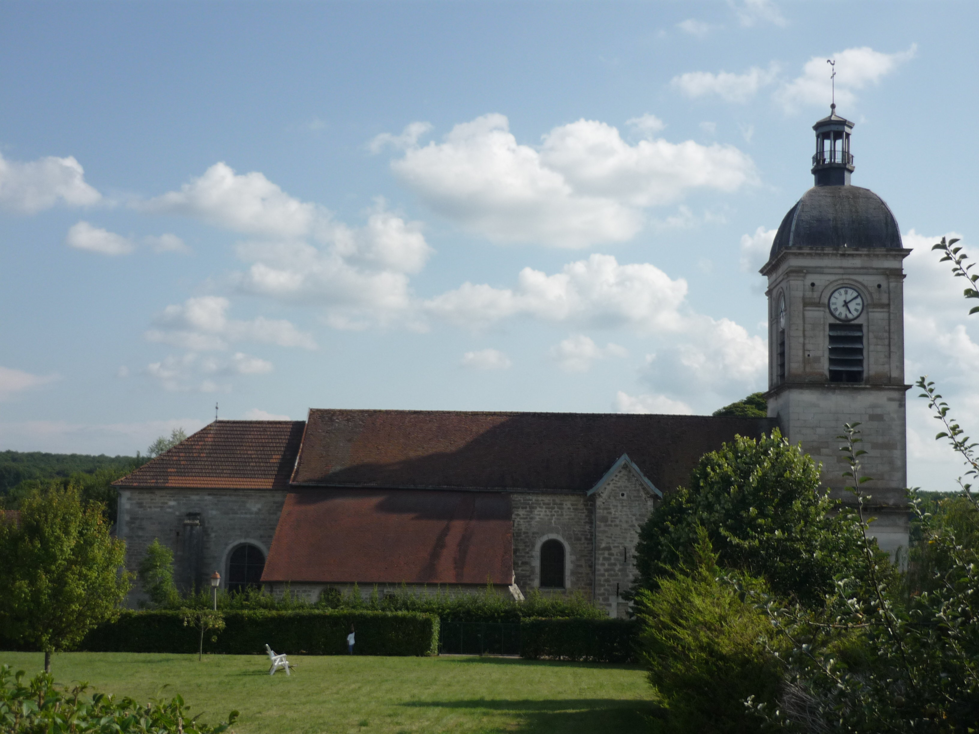 L'église de Dancevoir (Haute-Marne)